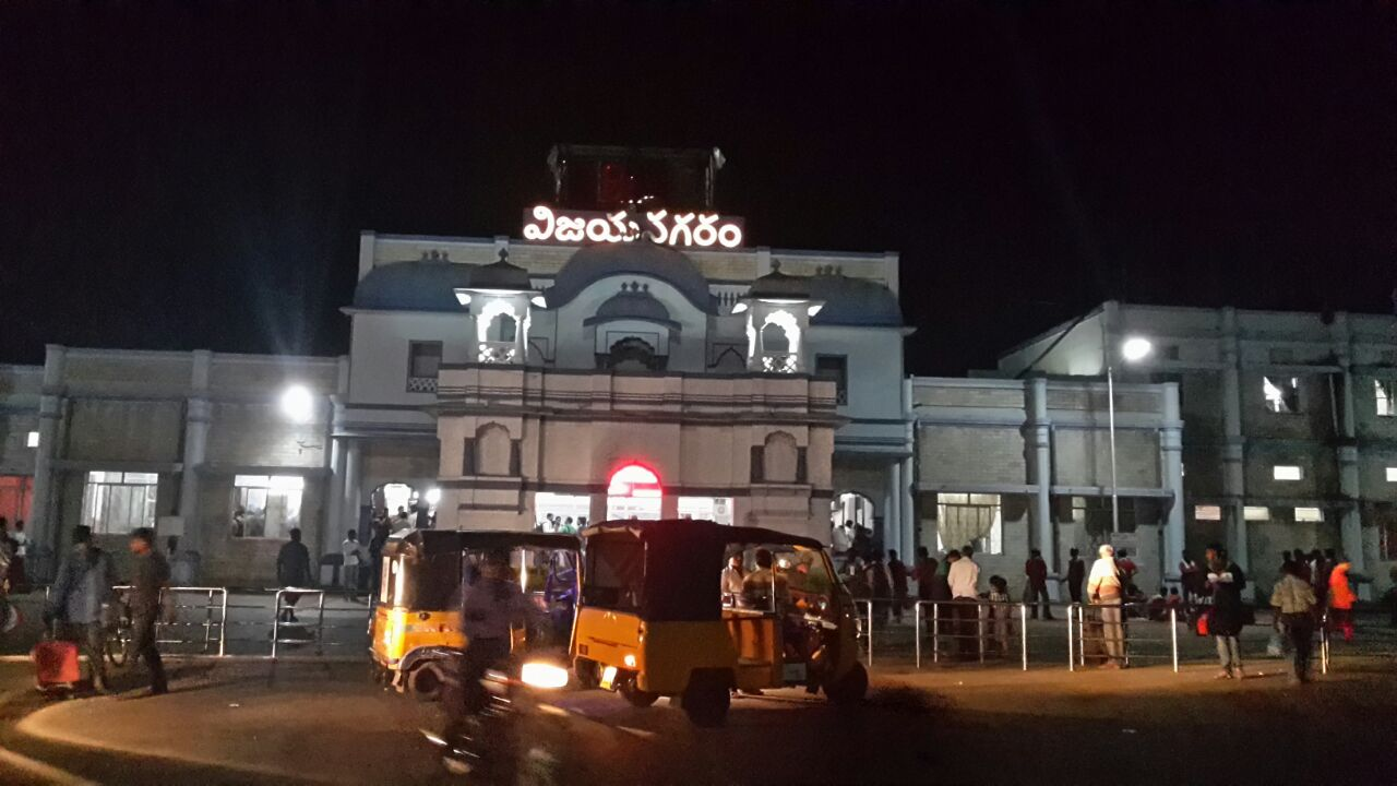 Vizianagaram Railway station at Night